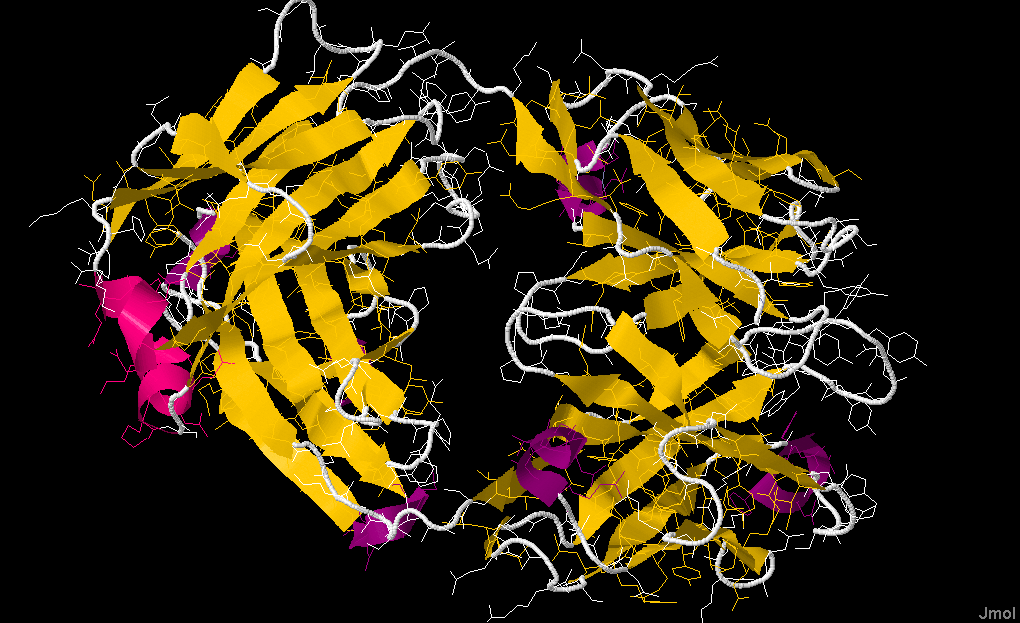 Kristallstruktur des Fab-Fragments von Ofatumumab